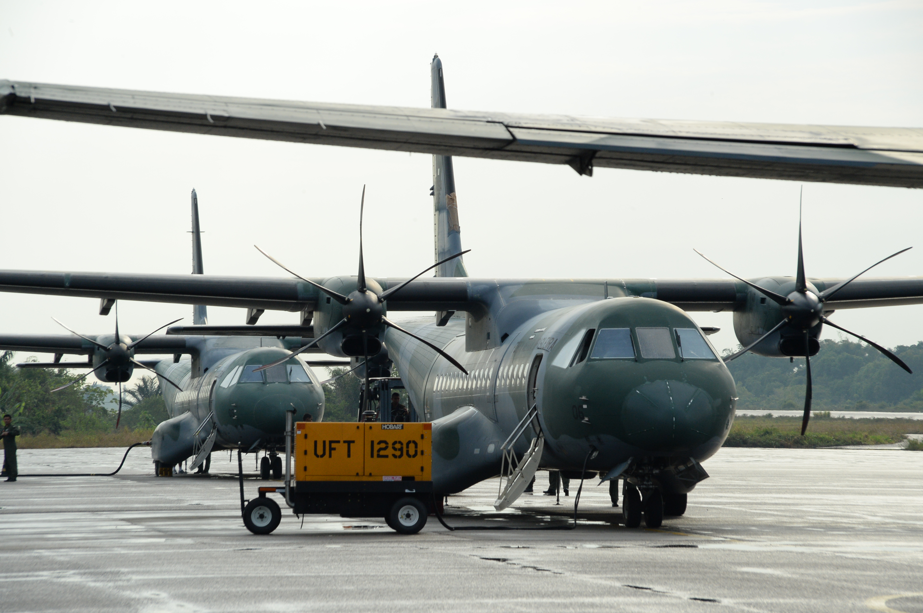 14/10/2014, Manaus - AM Fotos: Jorge Cardoso